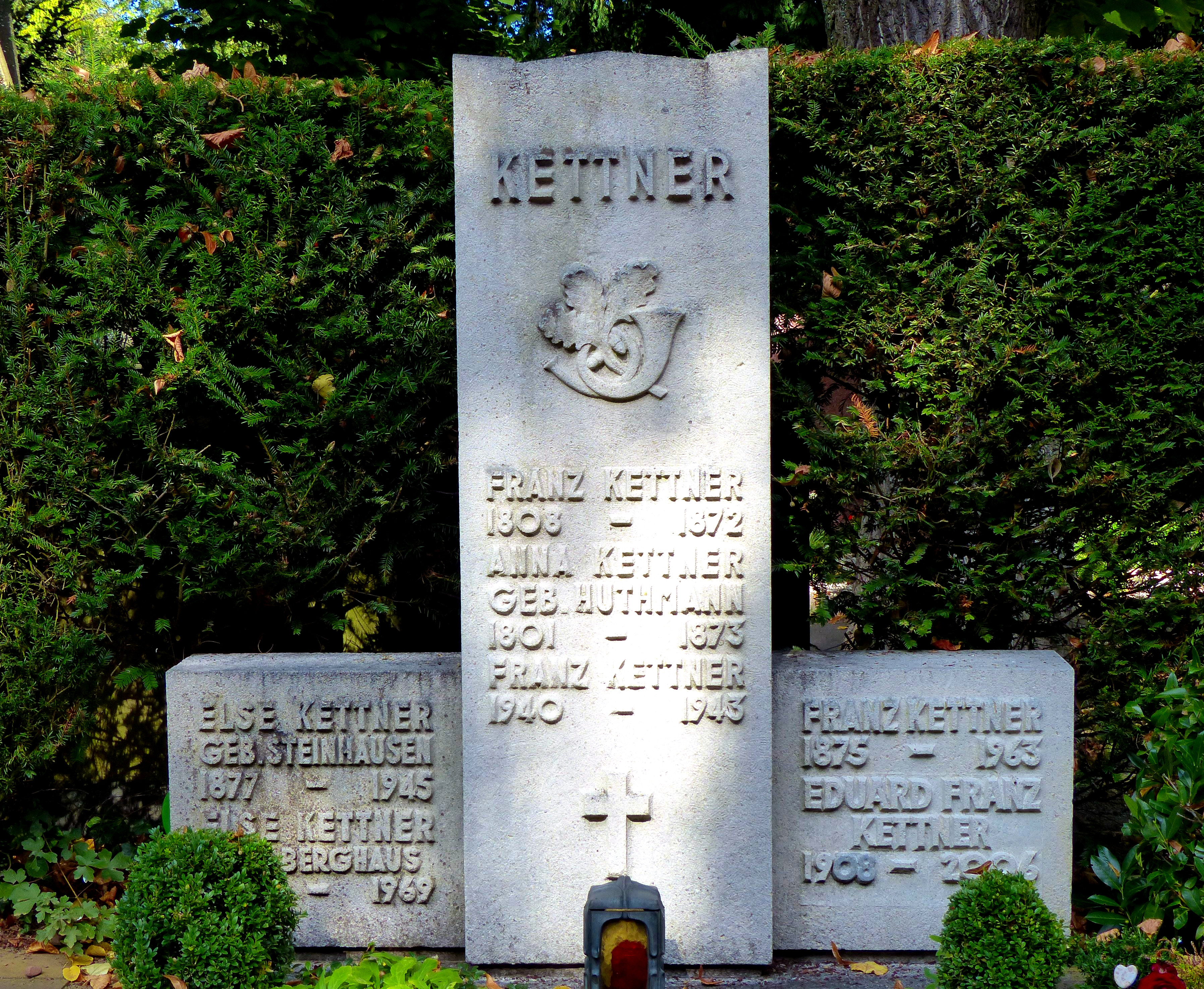 Melaten-Friedhof, Aachener Str. 204, Grabmal KettnerThis is a photograph of an architectural monument.